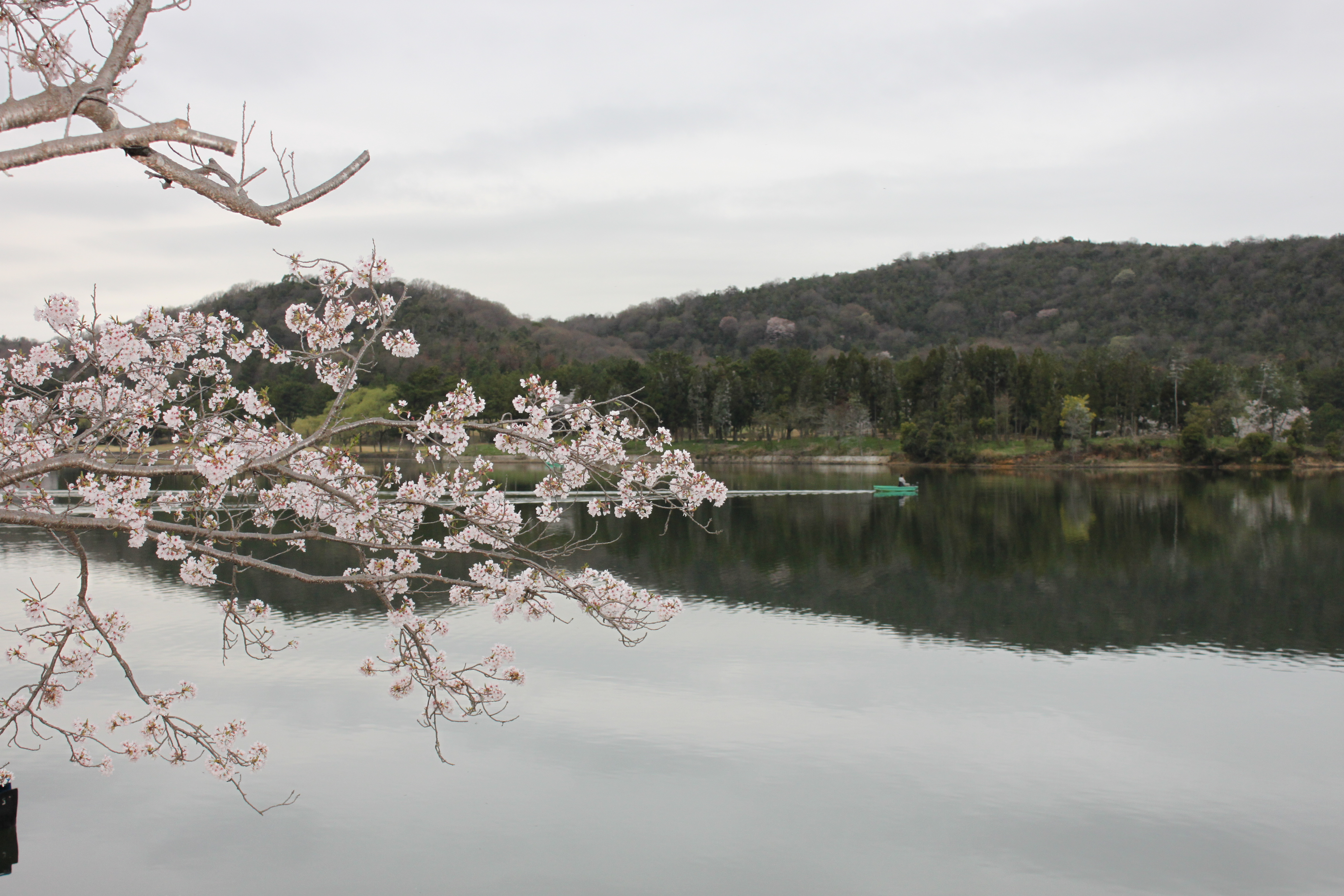 県立自然公園鴨池